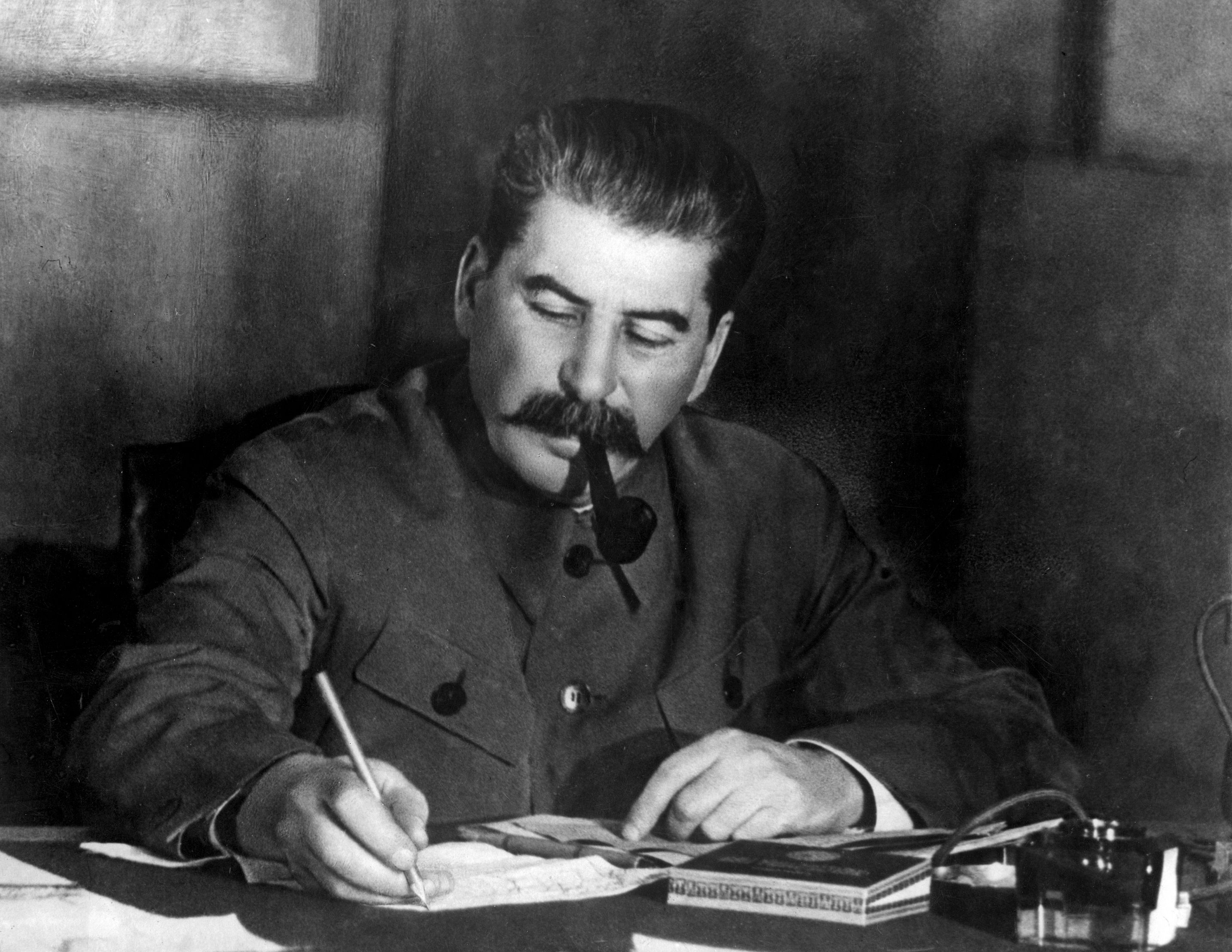 Voor de Tweede Wereldoorlog. Joseph Stalin, met pijp in de mond, schrijvend aan een bureau. Stalin, secretaris-generaal van het Centraal Committee van de Communistische Partij van de Sovjet Unie tijdens een conferentie in het Kremlin, Moskou, maart 1935